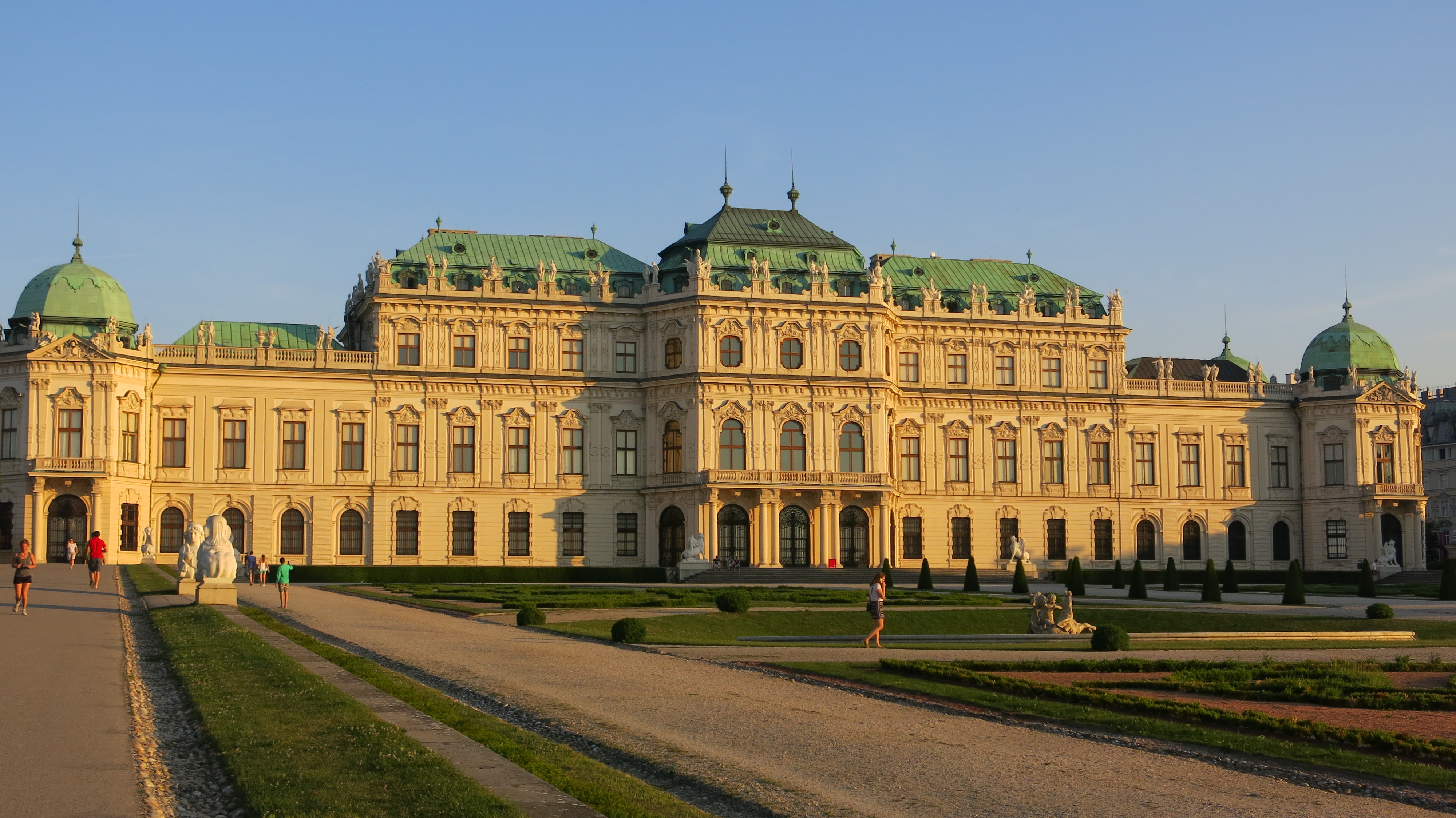 Unteres Belvedere – Klimt und die Ringstraße Dieses Bild wurde anlässlich des österreichischen Tags des Denkmals 2015 in Wien eingereicht.